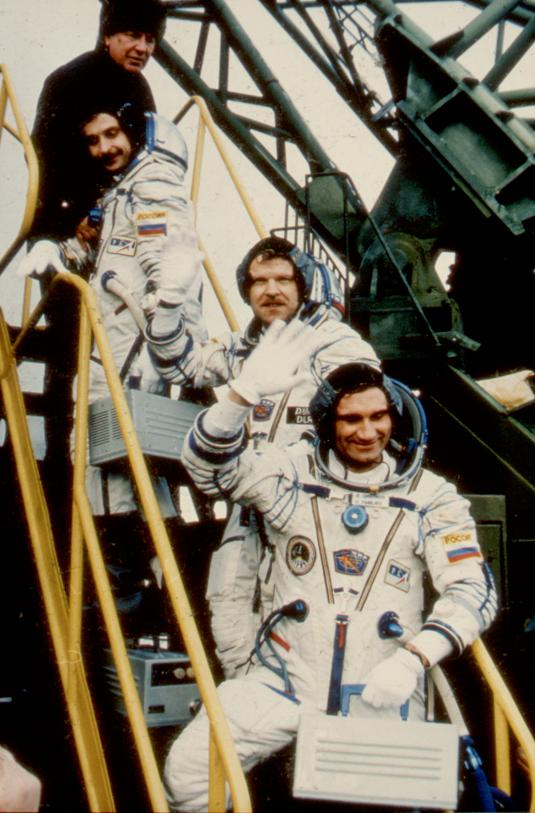 Aus dem Archiv: Die Besatzung von Sojus TM 25, Rufname Sirius, auf der Treppe zum Aufzug, der sie zur Einstiegsluke der Rakete bringen wird. Von unten nach oben: Wassilij Zibliew, Kommandant, Reinhold Ewald, Wissenschaftsastronaut, und Alexander Lasutkin, Bord-Ingenieur. Die Besatzung steigt ungefähr zwei Stunden vor dem Start in die Kapsel ein. Die 'Skaphander' genannten Raumanzüge schützen die Besatzung im Falle eines Druckverlustes in der Kapsel.